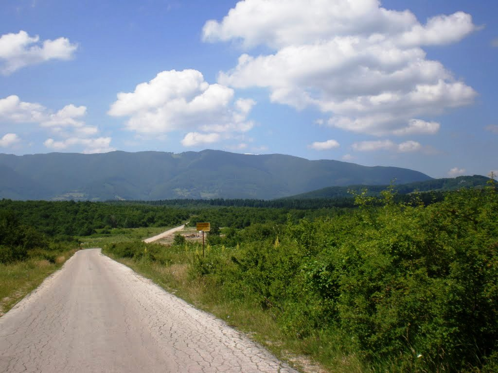 Pogled na Lisinu sa puta pored smetljišta, prema Trijebovu. Opština Mrkonjić Grad.